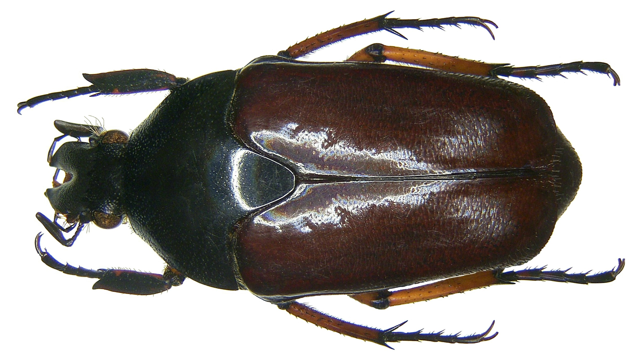 Familie: Scarabaeidae Größe: 30 mm Verbreitung: Papua Neuguinea Fundort: West-Papua, Manokwari, Arfak Mts. leg. 2007; det. U.Schmidt, 2008 Foto: U.Schmidt, 2008